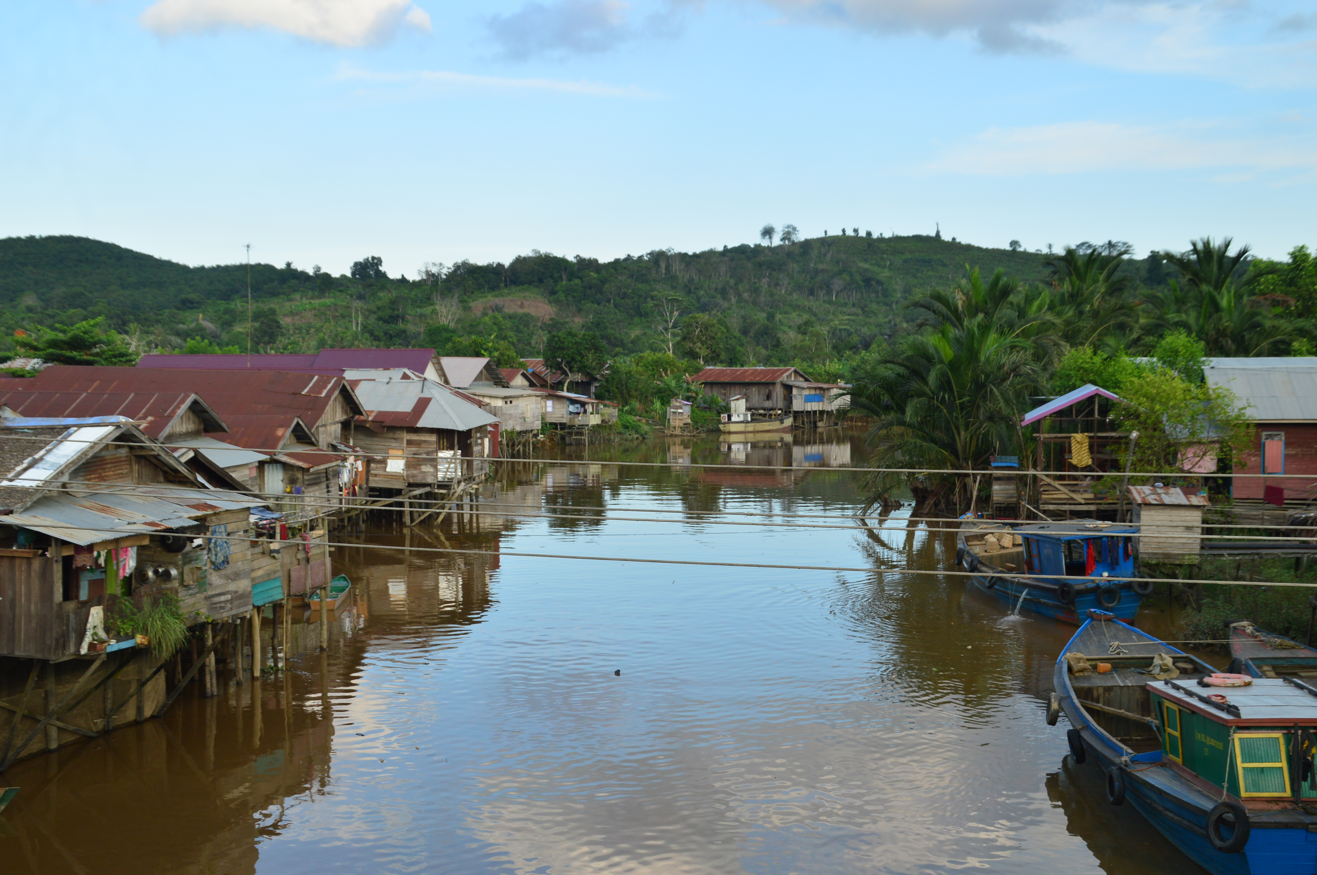 Sungai Loa Haur, anak sungai Mahakam yang memisahkan wilayah desa Loa Duri Ulu dan Bakungan di kecamatan Loa Janan, Kabupaten Kutai Kartanegara, Kalimantan Timur.